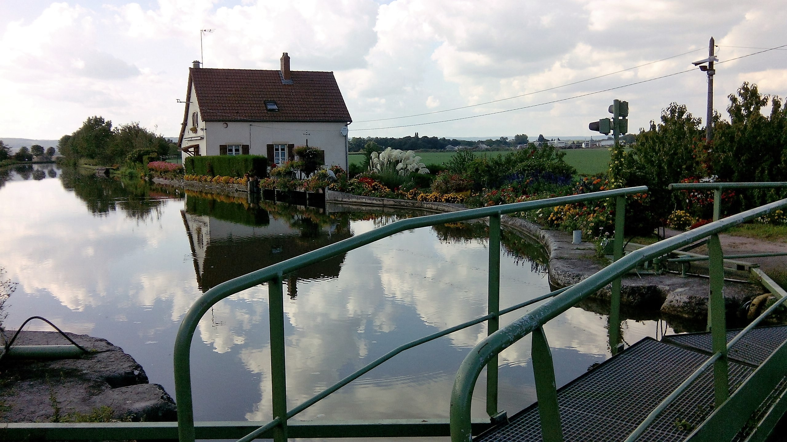 Canal du Centre - écluse de Fontaines, près de Chalon-sur-Saône (Saône-et-Loire)